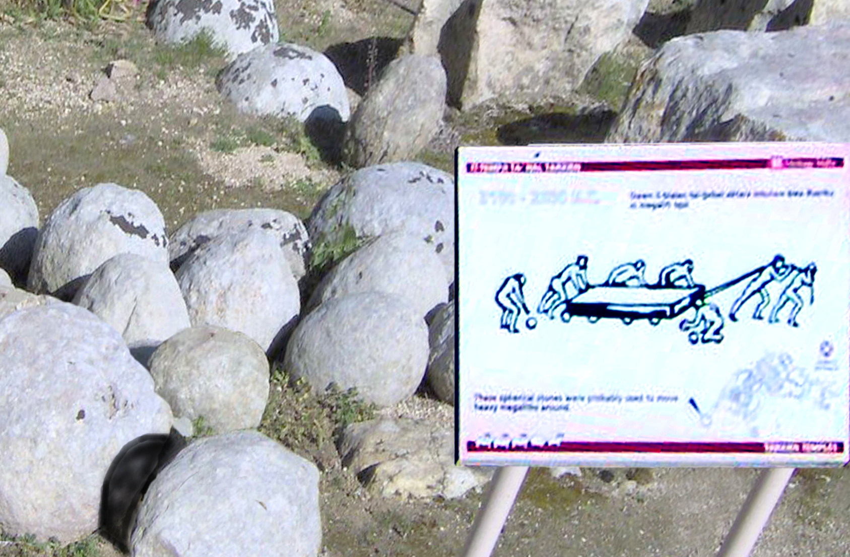 boulets de pierre permettant le déplacement des pierres mégalithiques